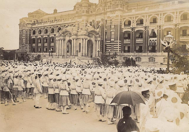 中文（台灣）: 裕仁太子來台巡視行程自西元1923年（大正12年）年4月12日起為期12天，自橫須賀港出發，由基隆至屏東，行啟整個台灣西部，甚至遠至澎湖。圖為聚集在台北總督府（今總統府）的公小學校（今國民小學）學生，手持日本國旗歡迎裕仁太子的盛大場面。